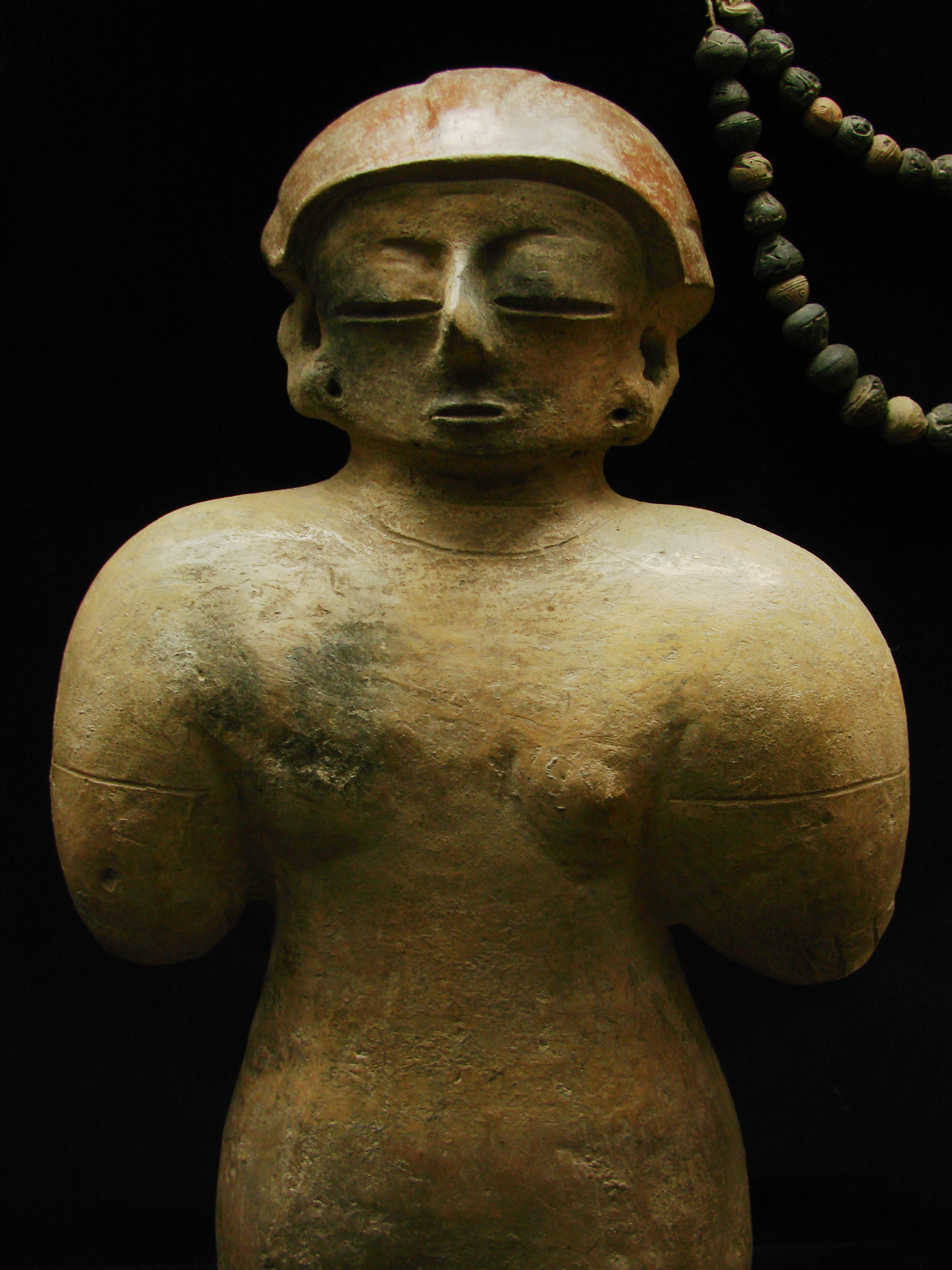 Statuette de la culture Chorrera (1800 - JC / 300 + JC). Musée d'Auch.